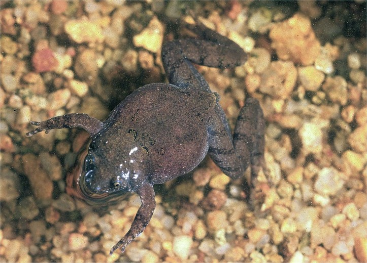 Paradoxophyla tiarano